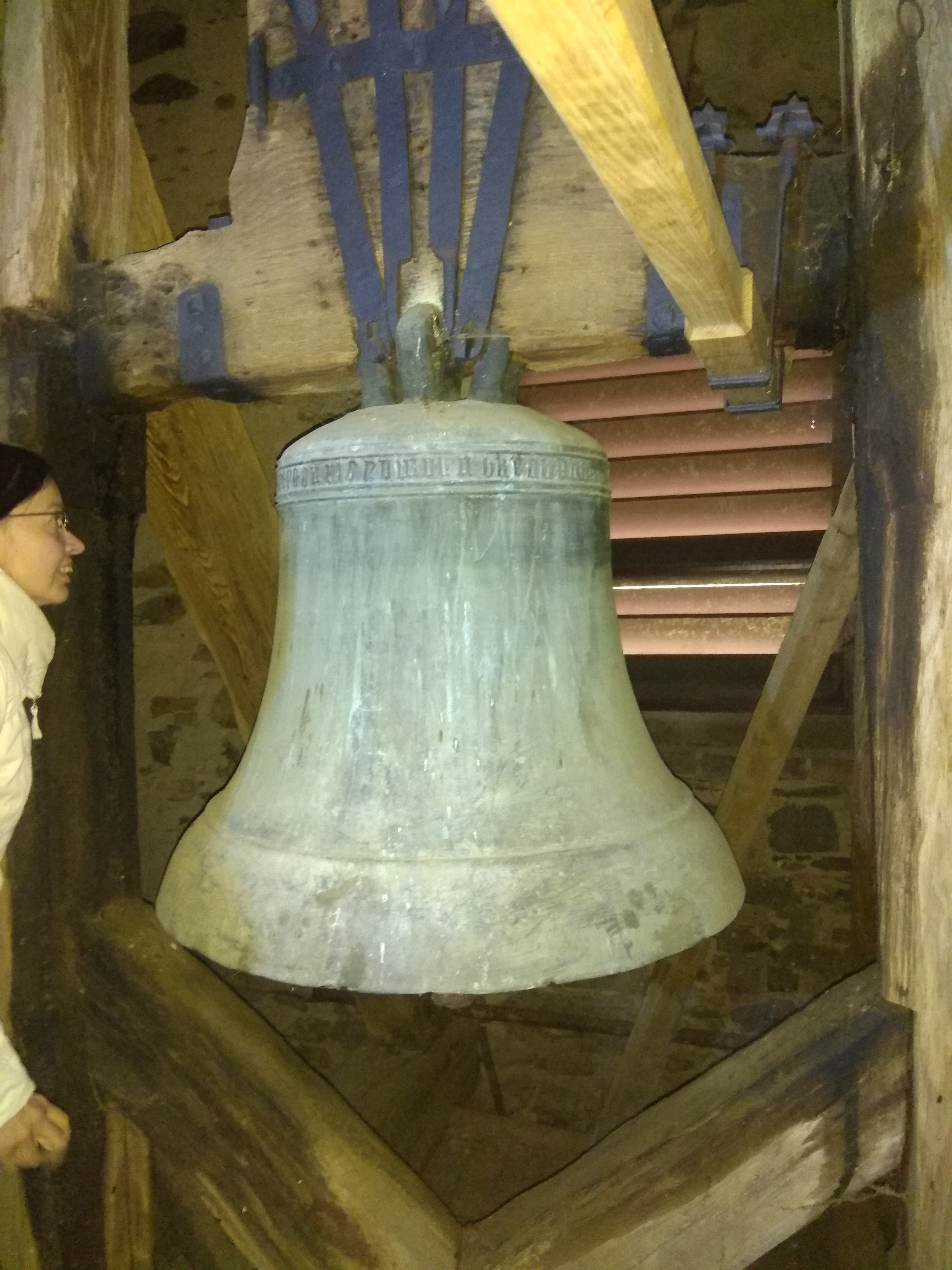 Olešky kostel - zvon ve věži